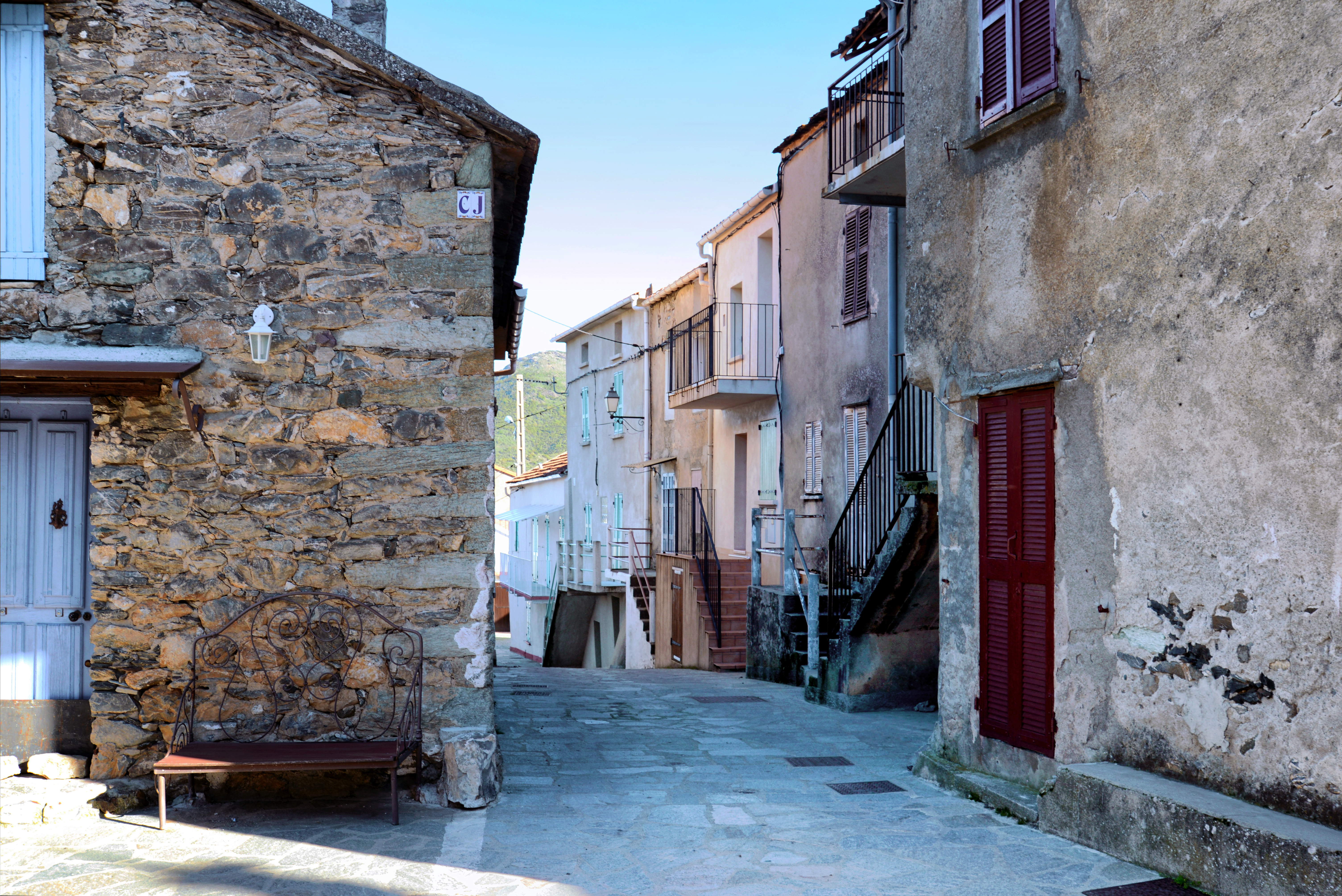 Noceta, Centre Corse - Rue principale du village